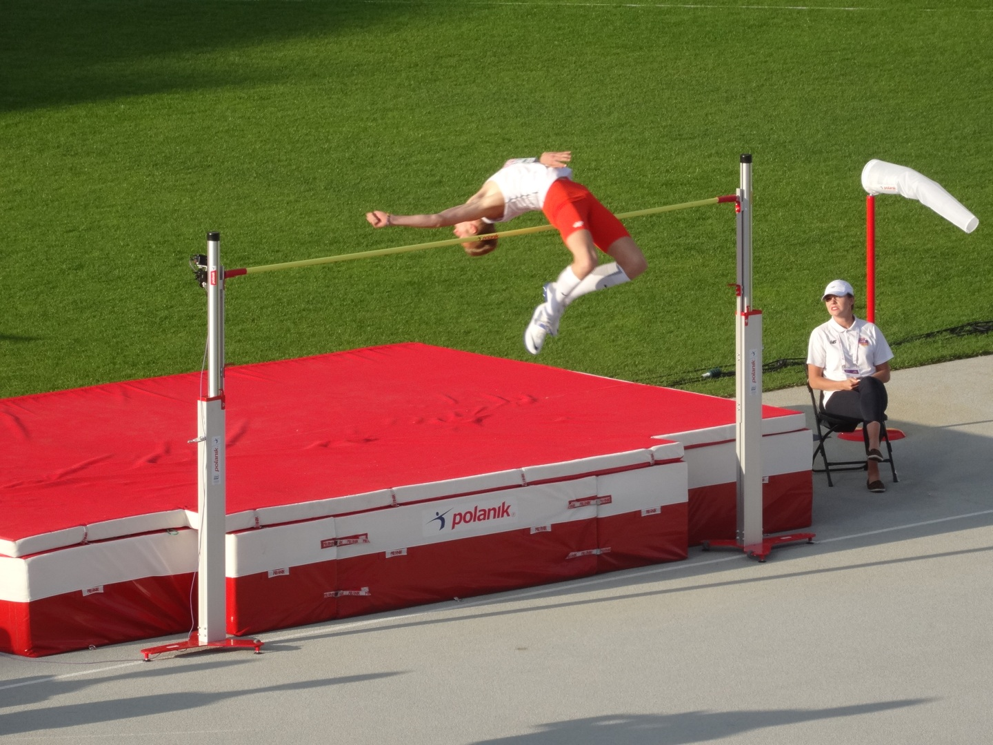 Młodzieżowe Mistrzostwa Europy w Lekkoatletyce U23 w Bydgoszczy 13-16 lipca 2017, finał skoku wzwyż mężczyzn